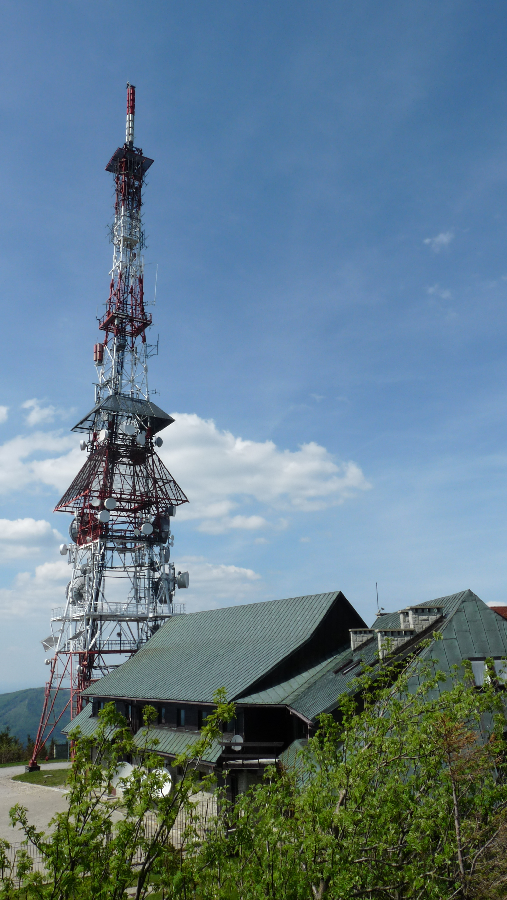 Nadajnik RTV na Skrzycznem. Maj 2014.